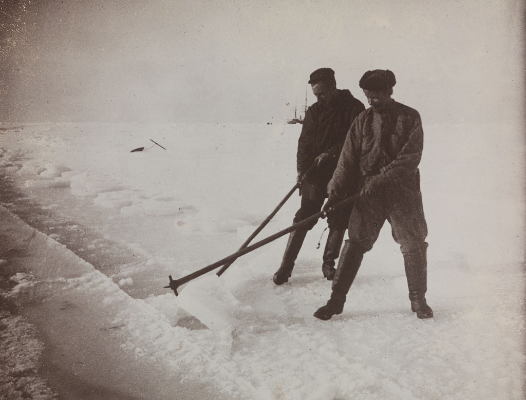 Tittel / Title: Roald Amundsen og Engelbret Knudsen Motiv / Motif: Amundsen og Knudsen fjerner det øverste laget av isen for å forberede saging av det harde, nederste laget. Planen var å lage en kanal gjennom isen for å frigjøre "Belgica" før isen tvang mannskapet til enda en overvintring. Dato / Date: januar 1899 Fotograf / Photographer: Frederick A. Cook (1865-1940) Sted / Place: Antarktis Eier / Owner Institution: Nasjonalbiblioteket / National Library of Norway Lenke / Link: Bildesignatur / Image Number: bldsa_SURA0679